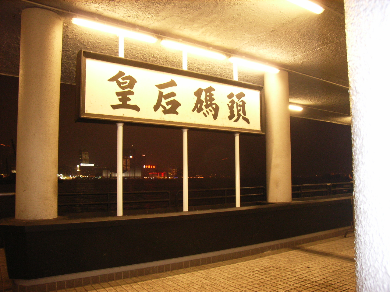 香港皇后碼頭 HK Queen's Pier, Central, Hong Kong